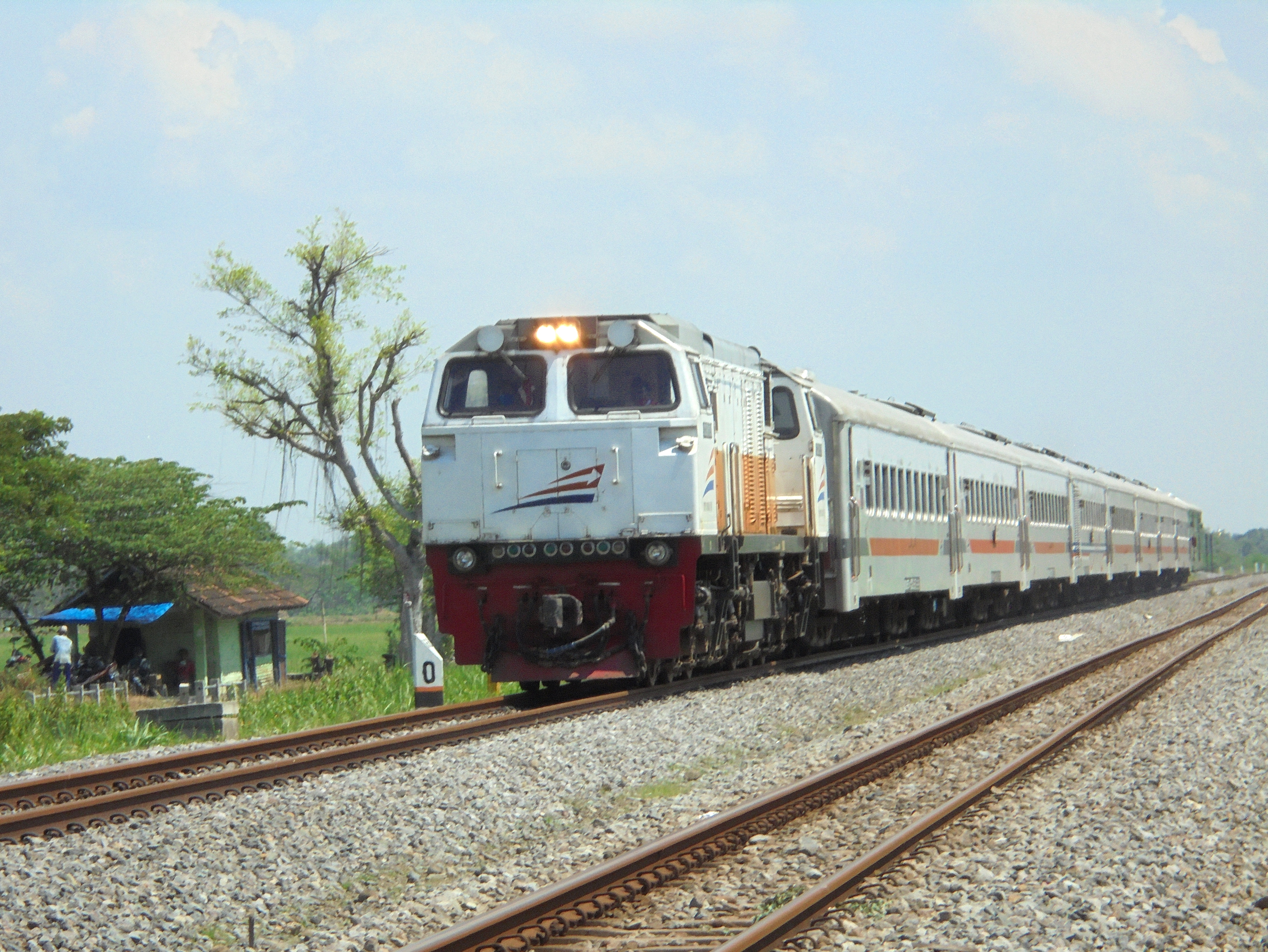 Kereta api Kahuripan saat melintas di Ngegong, Manguharjo, Madiun. Ditarik menggunakan lokomotif CC206 13 31 YK